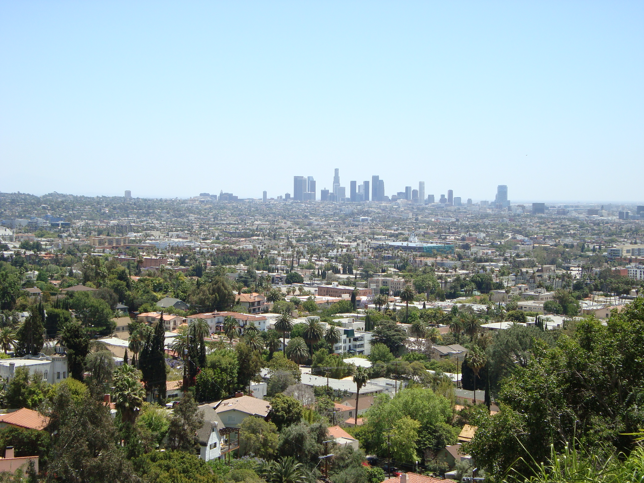 Los Angeles